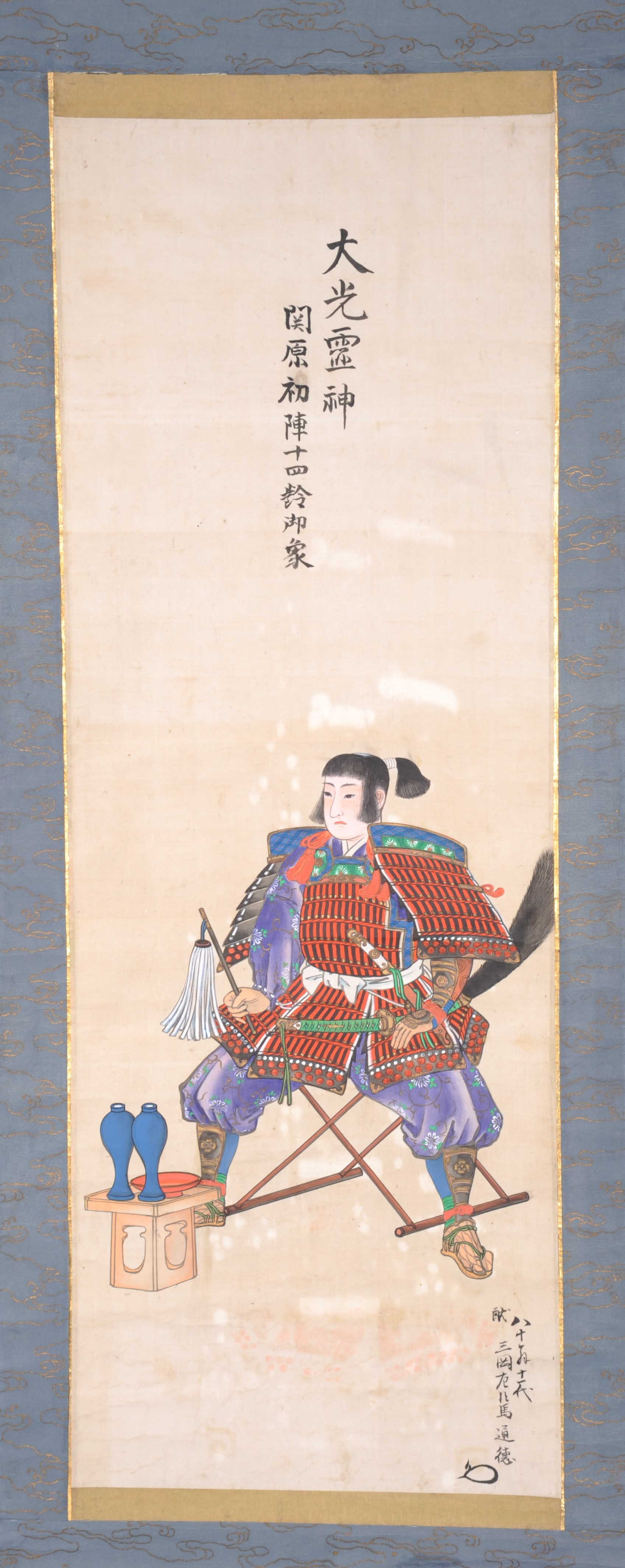 細川興元の肖像(14歳の初陣図、モノクロ)。